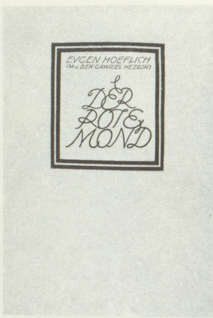 Eugen Hoeflich Der rote Mond 1920 Einband